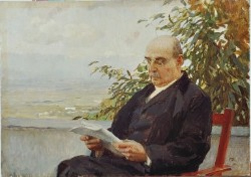 Ritratto di Corrado Ricci, olio su tela, 34.5 x 24.5 cm., Museo civico di Ravenna